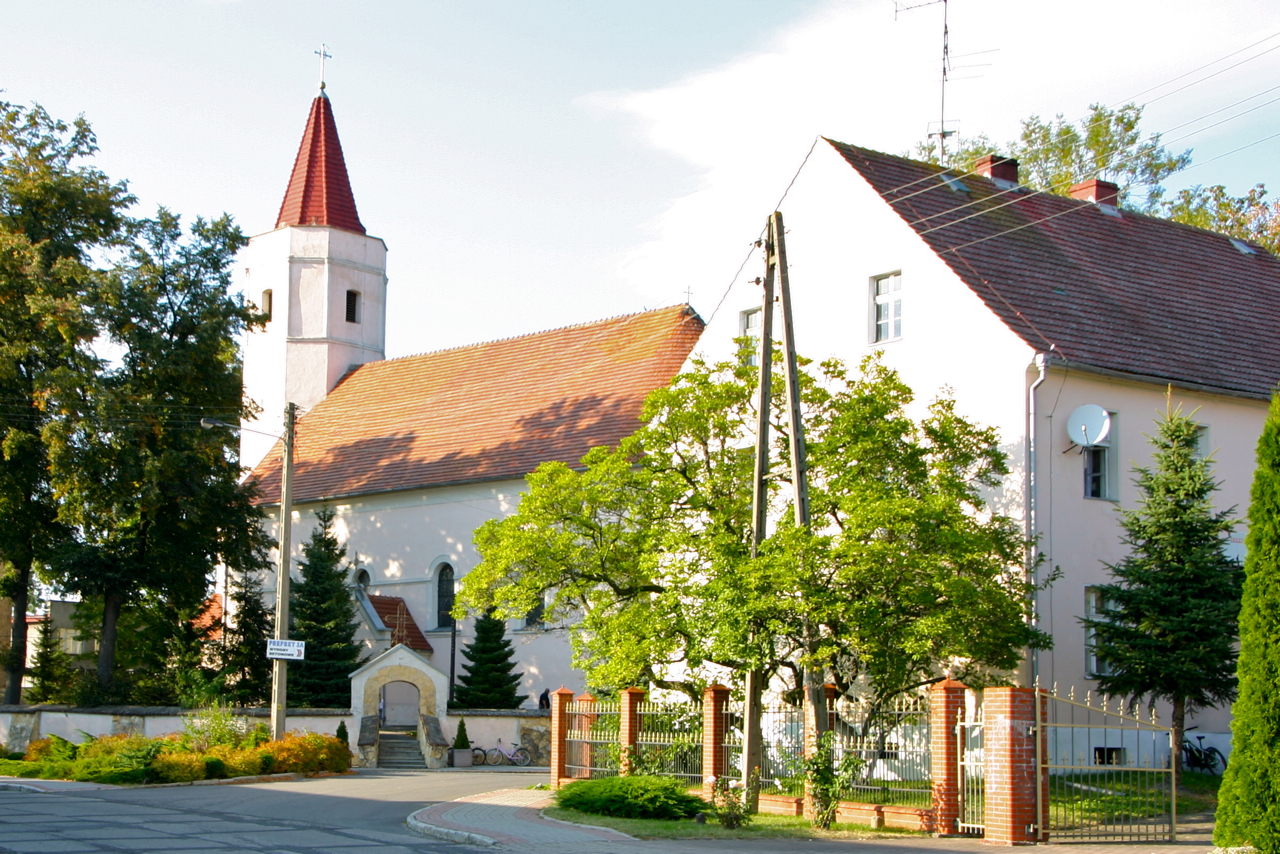 Lubrza (niem. Leuber) – kościół parafialny p.w. św. Jakuba, 1600, XVIII w. (zabytek nr 567/59 z 3.04.1959)